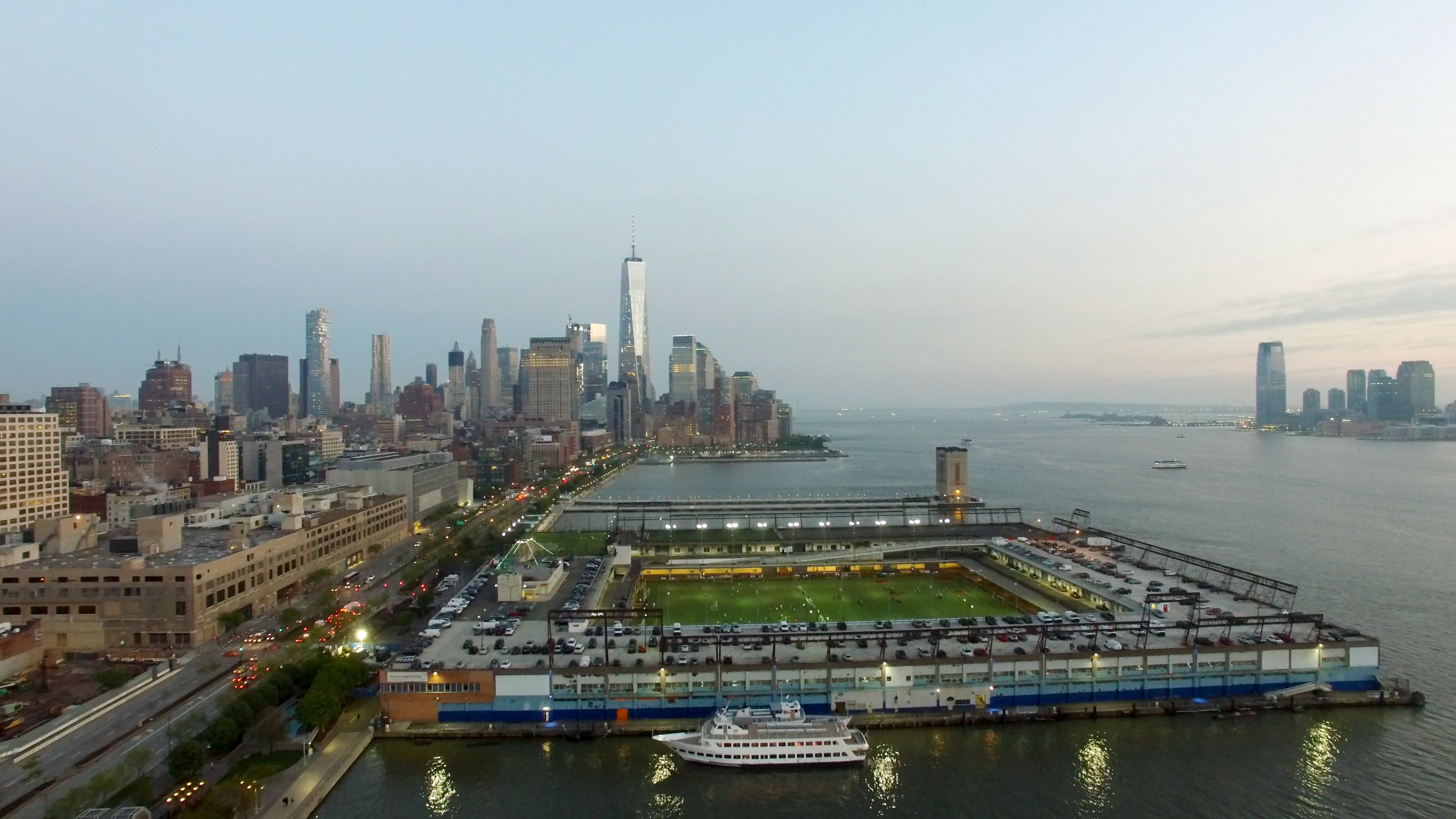 Manhattan20160507-021-1